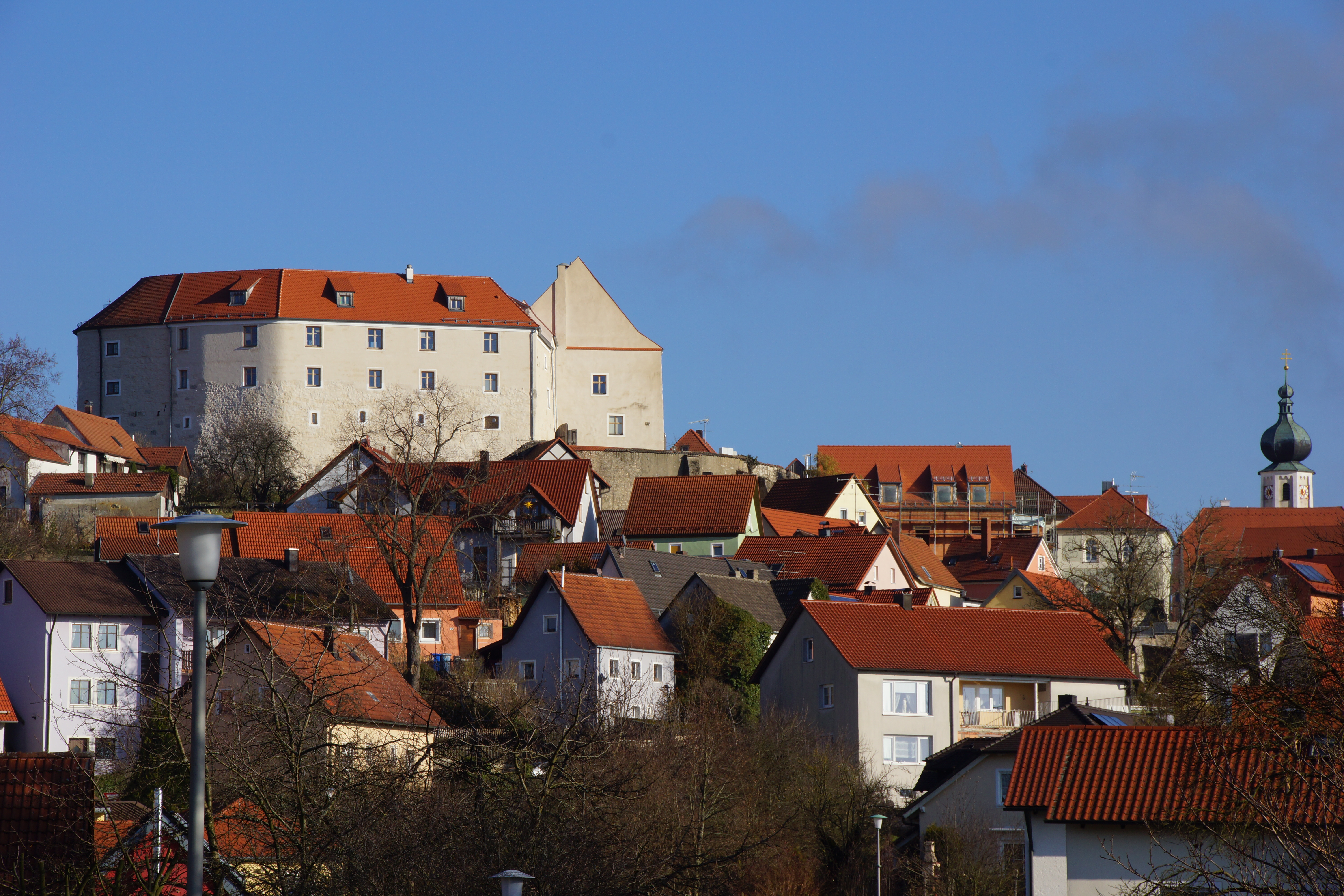 Markt Lupburg in der Oberpfalz / Landkreis Neumarkt